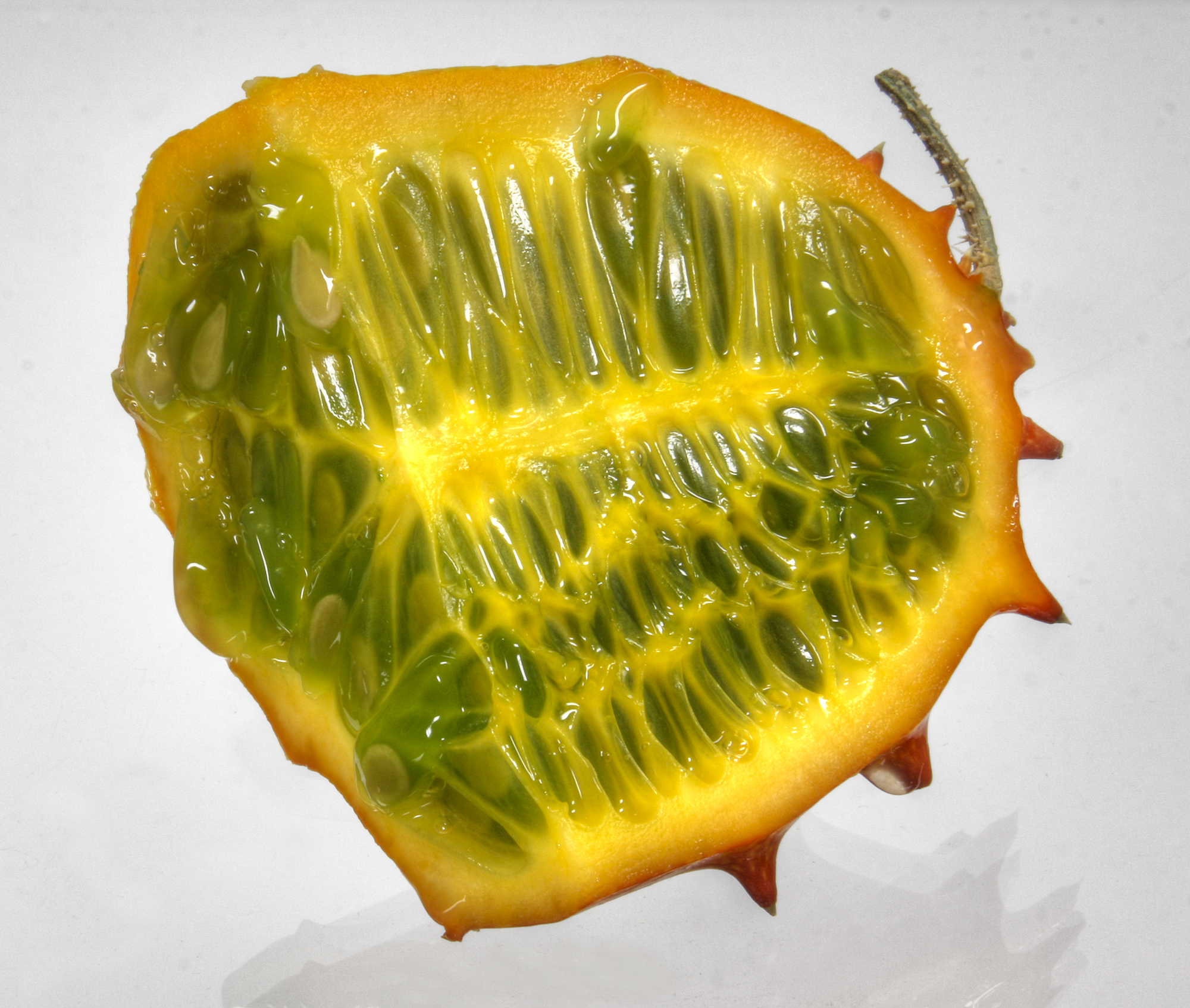 Horngurke (Kiwano) aufgeschnitten